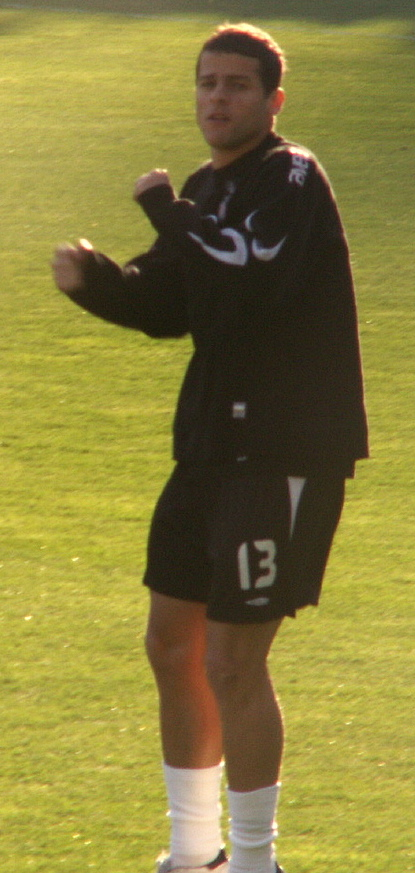 Deivson Rogério da Silva-Beşiktaş Jimnastik Kulübü